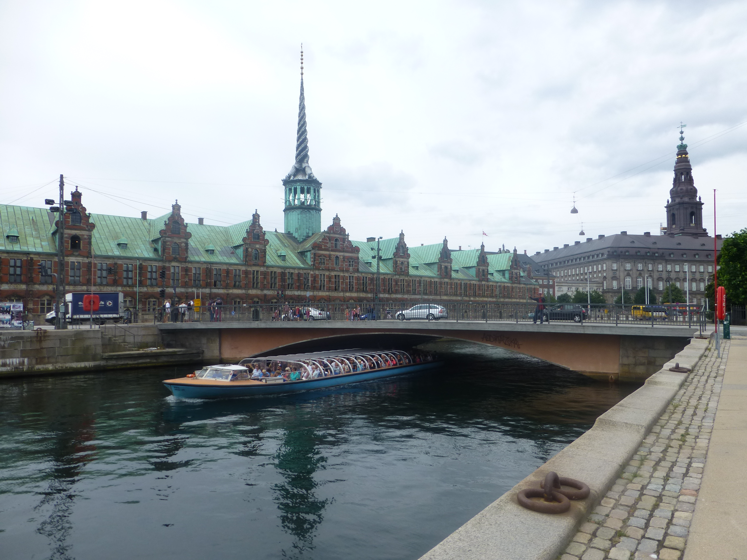 The bridge Børsbroen between Sjælland and Slotsholmen in Copenhagen.